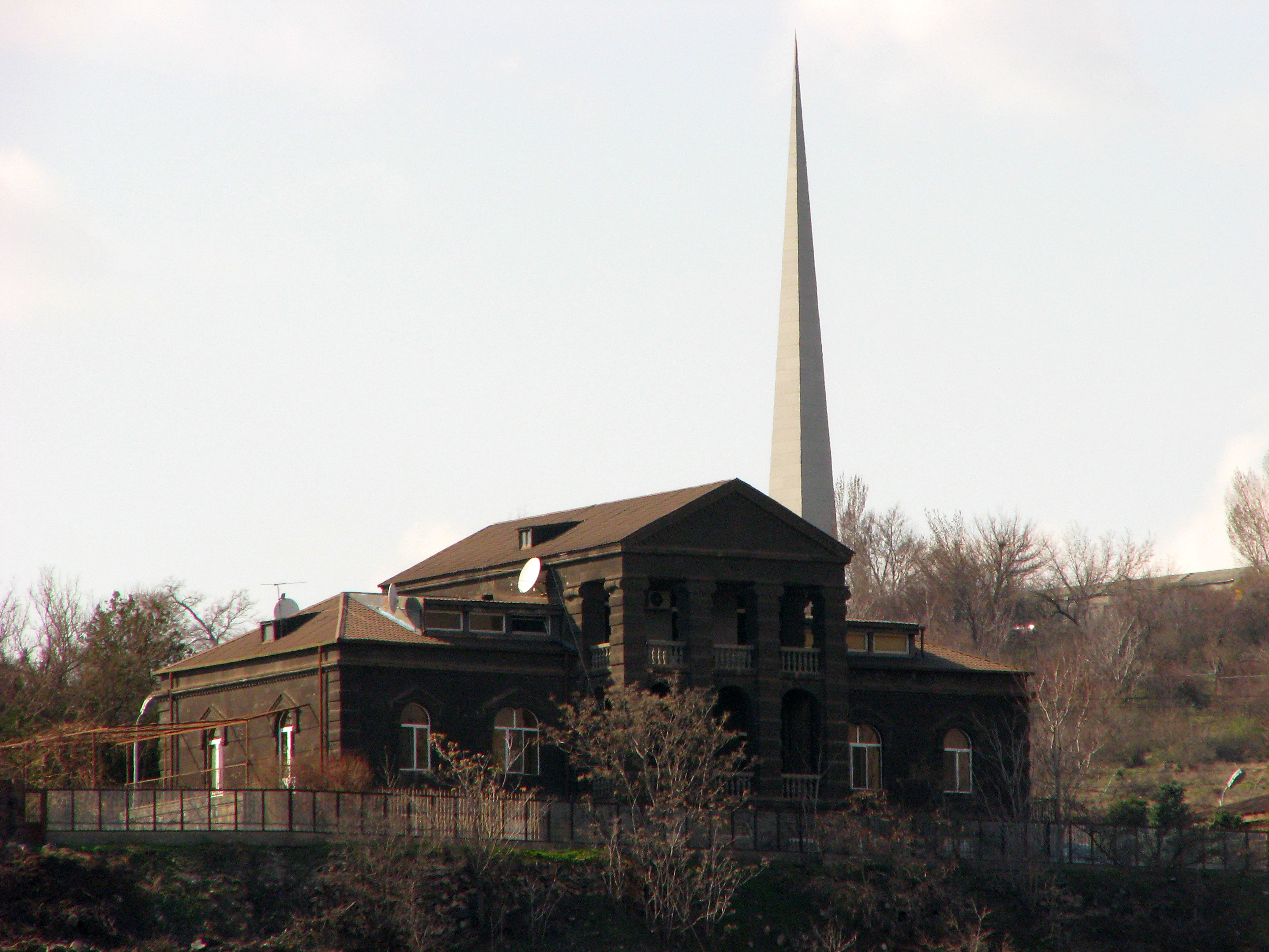 Աղասի Խանջյանի առանձնատունը